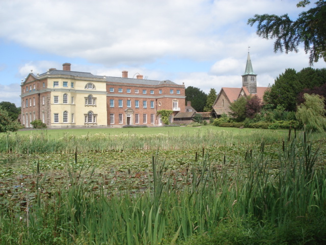 Kyre Park